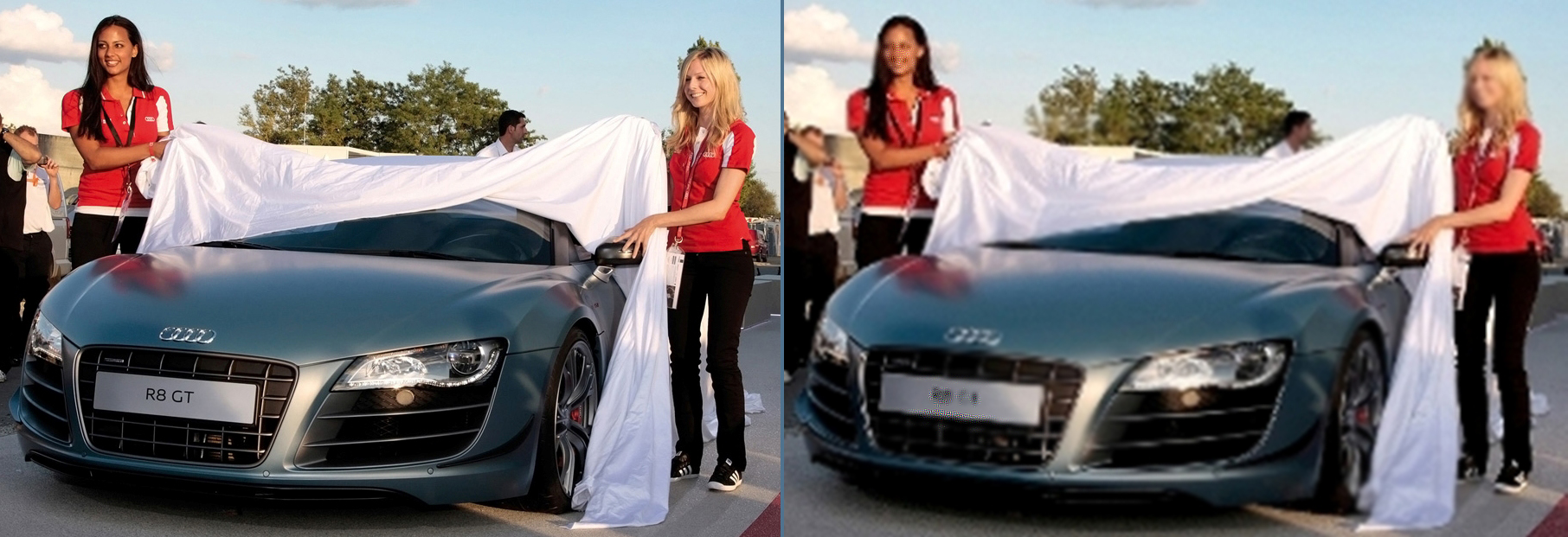 Сравнение натурального HD и снимка сделанного с интерполяцией